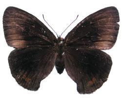 Calisto israeli